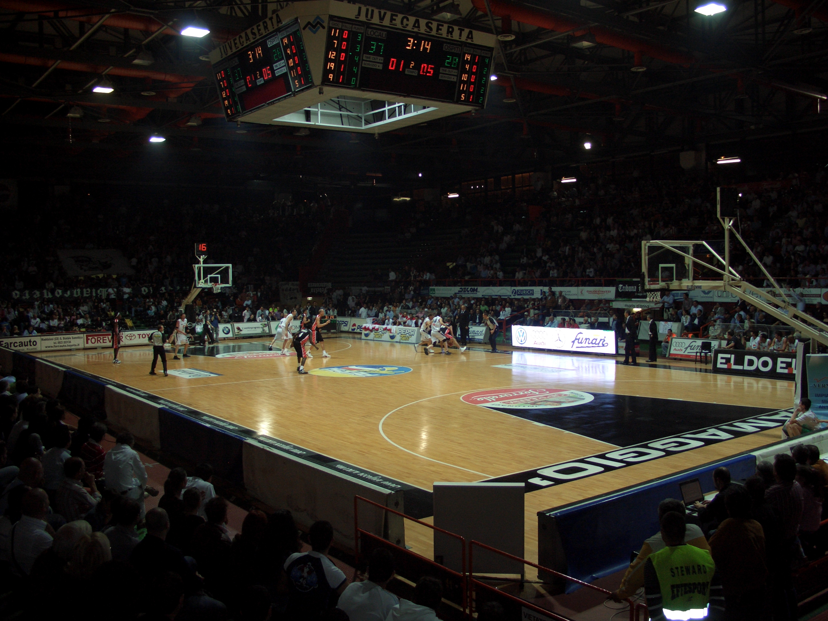 Il PalaMaggiò di Castel Morrone, Caserta, nel maggio 2008.